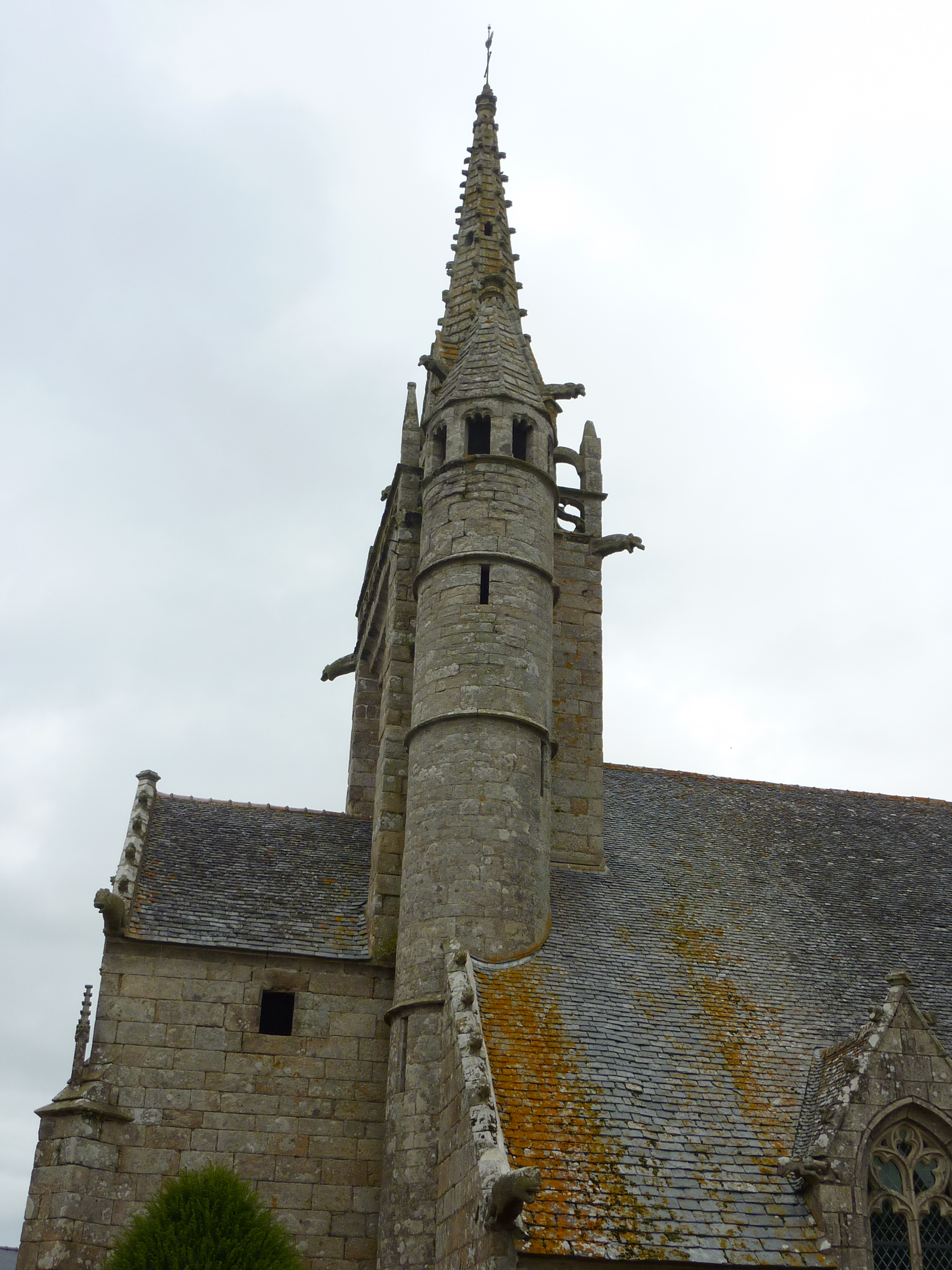 Plougonven: le clocher de l'église paroissiale